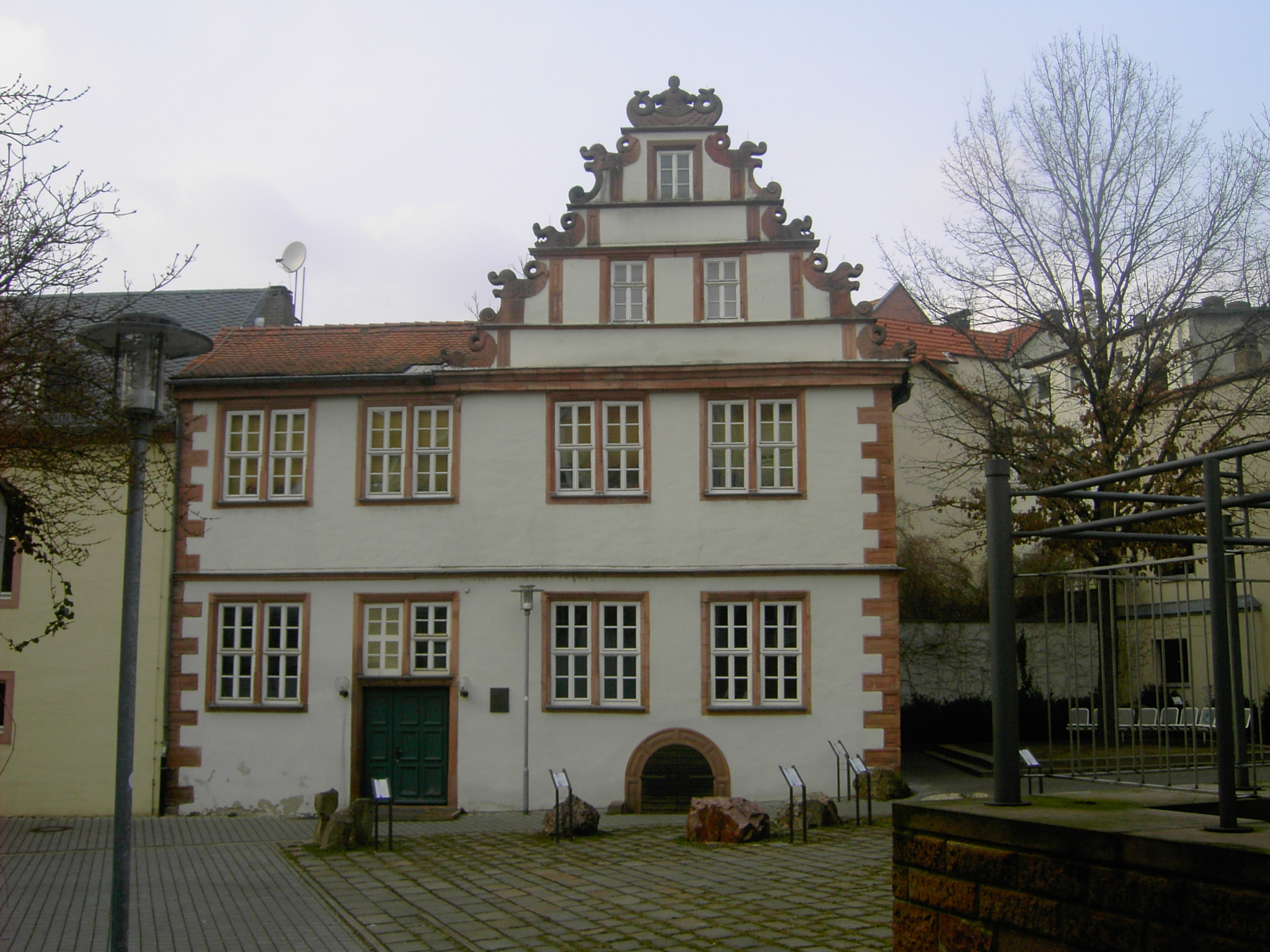 Das Storchennest ist ein renaissancegebäude in Aschaffenburg. Es befindet sich hinter dem Schönborn er Hof